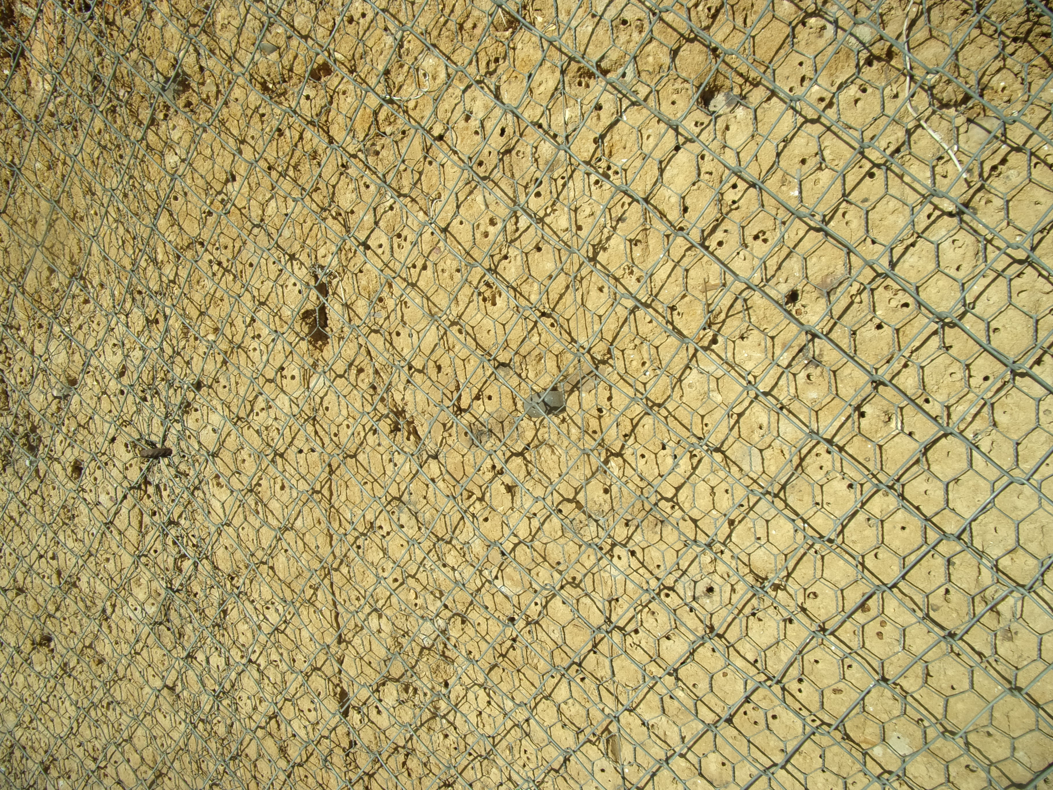 Détail de la coupe du rempart gaulois : noyau central en argile (Amboise)